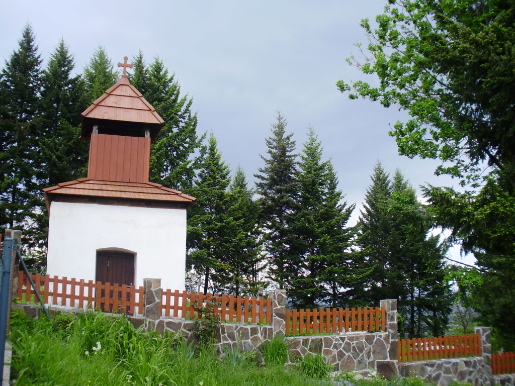 Stará zvonička